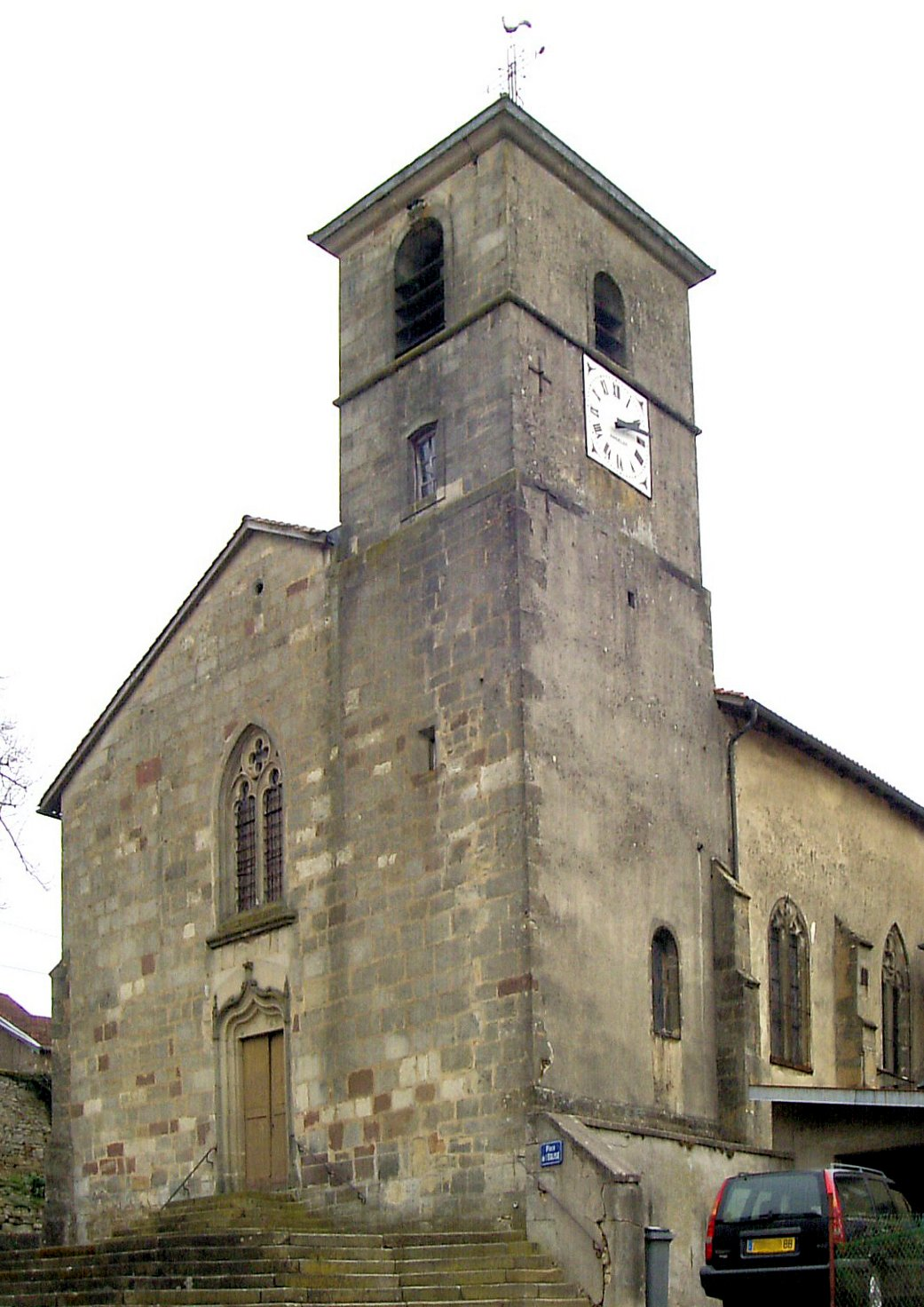 L'église Saint-Sulpice á Ville-sur-Illon